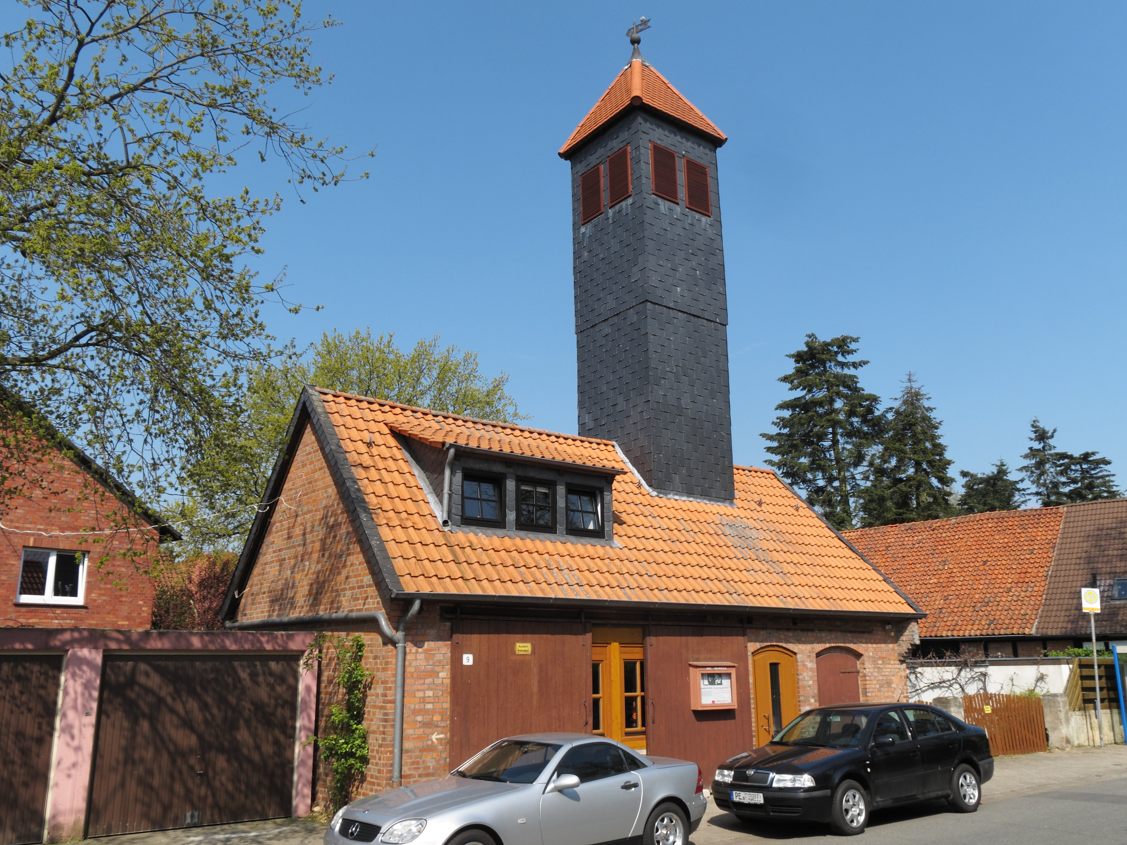 Wendeburg Neubrück, ehemaliges Feuerwehr-Gerätehaus